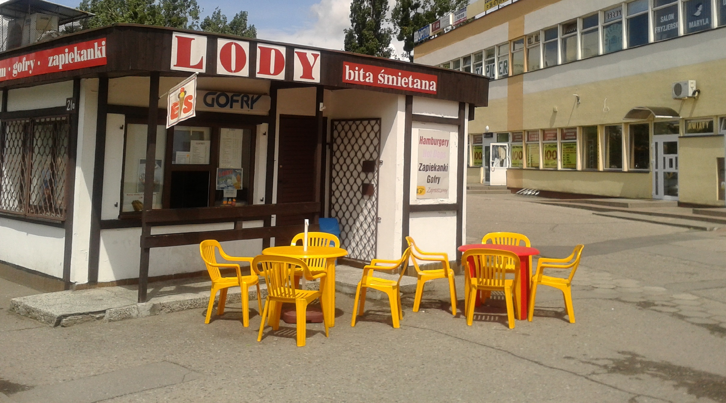 Budka z lodami na Rubinkowie 2 w Toruniu - ulica Dziewulskiego 21a